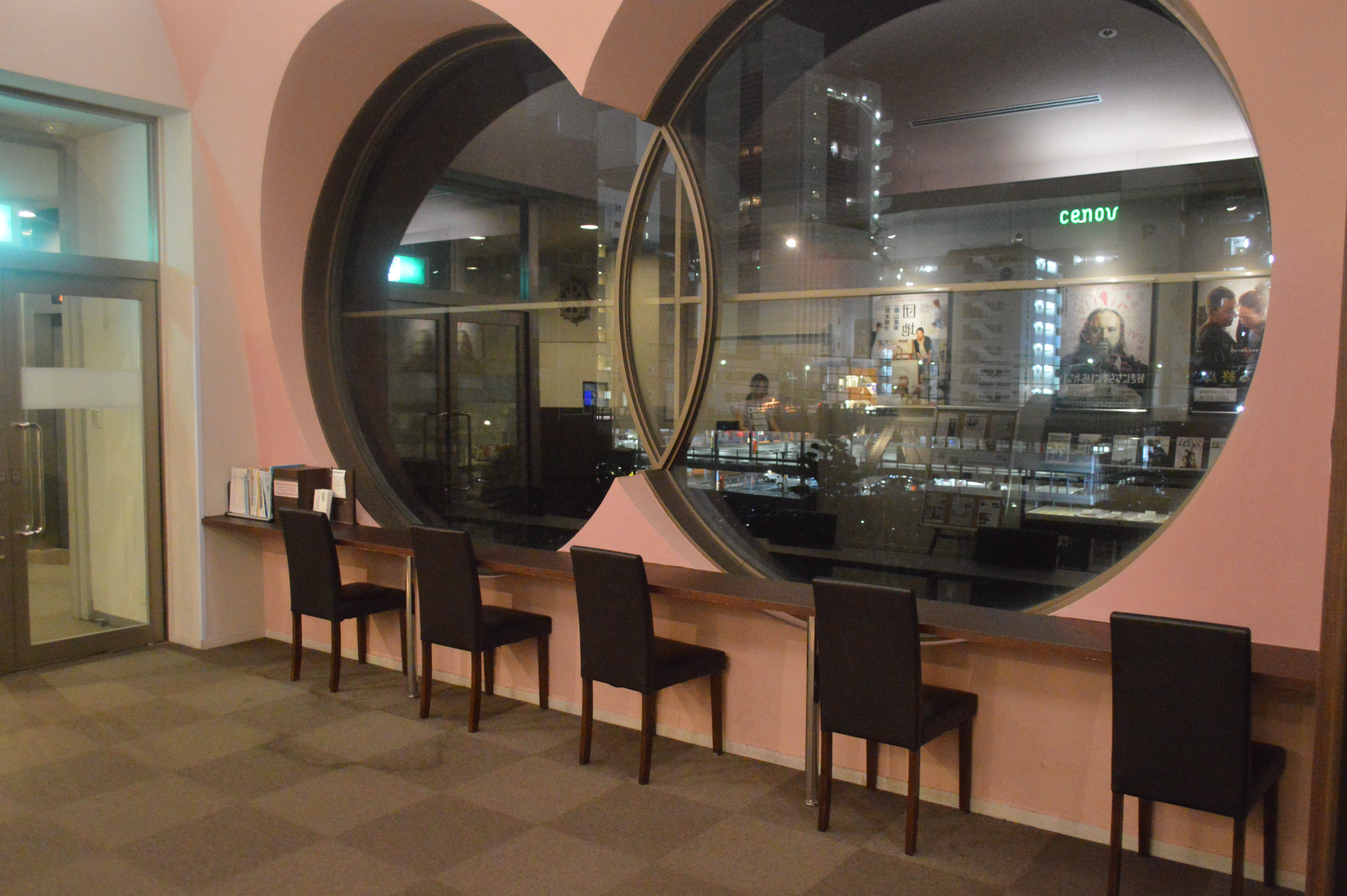 静岡市のサールナートホールに入っている映画館（ミニシアター）、静岡シネ・ギャラリー。